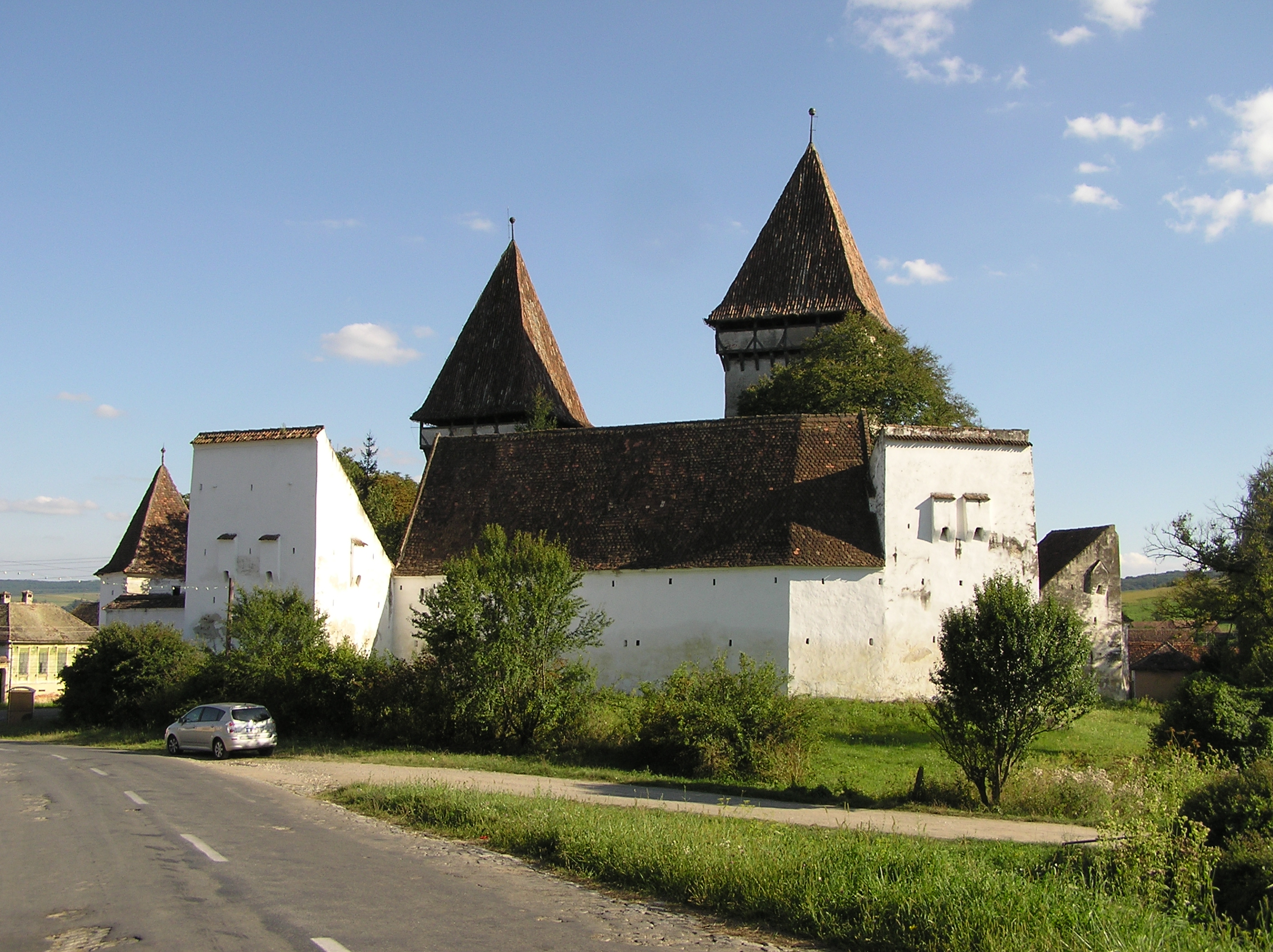 Die Kirchenburg von Dealu Frumos / Schönberg bei Hermanstadt, Siebenbürgen, Rumänien.